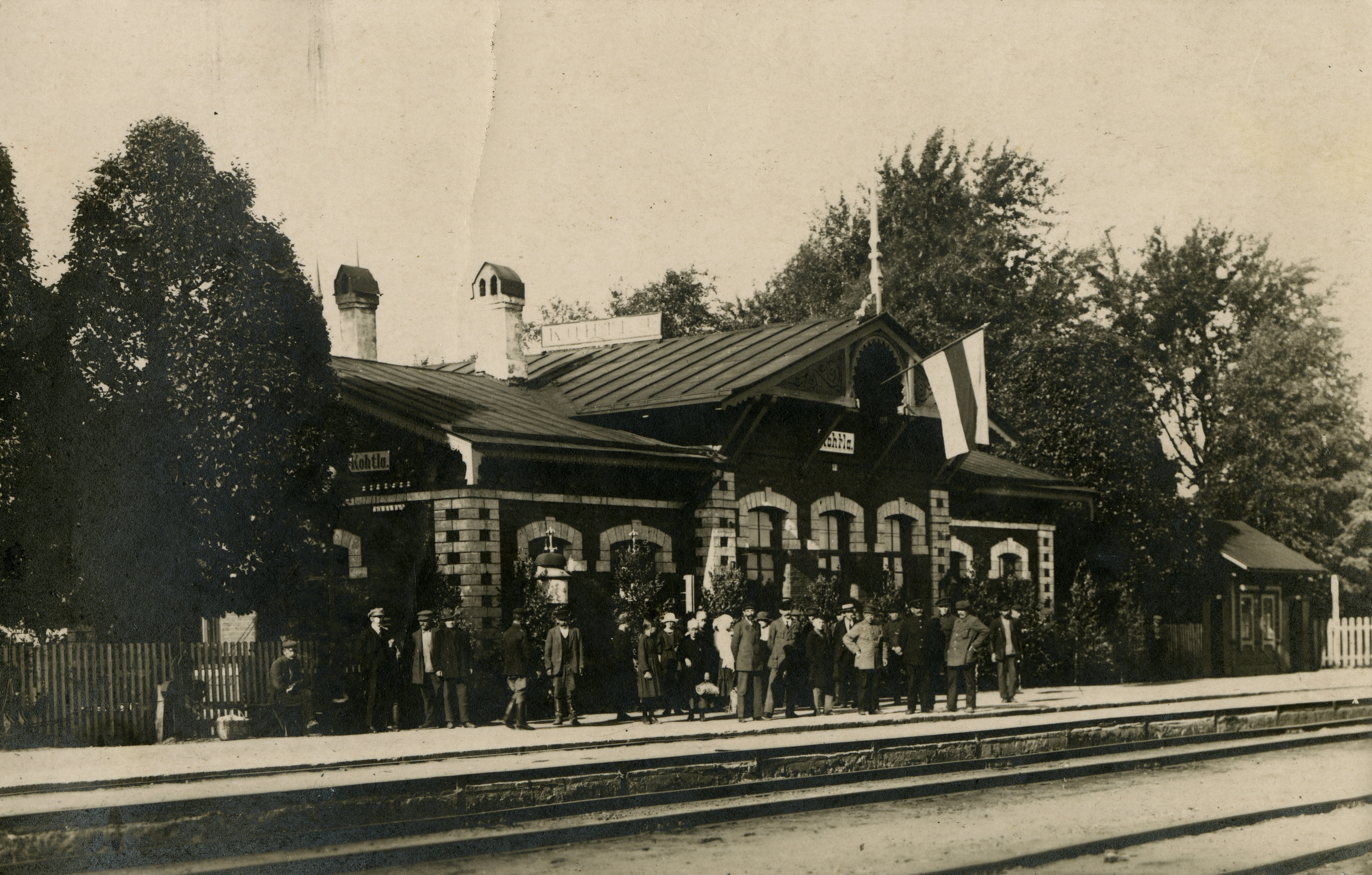 Kohtla jaamahoone enne Teist maailmasõda. Teises maailmasõjas hoone hävis.